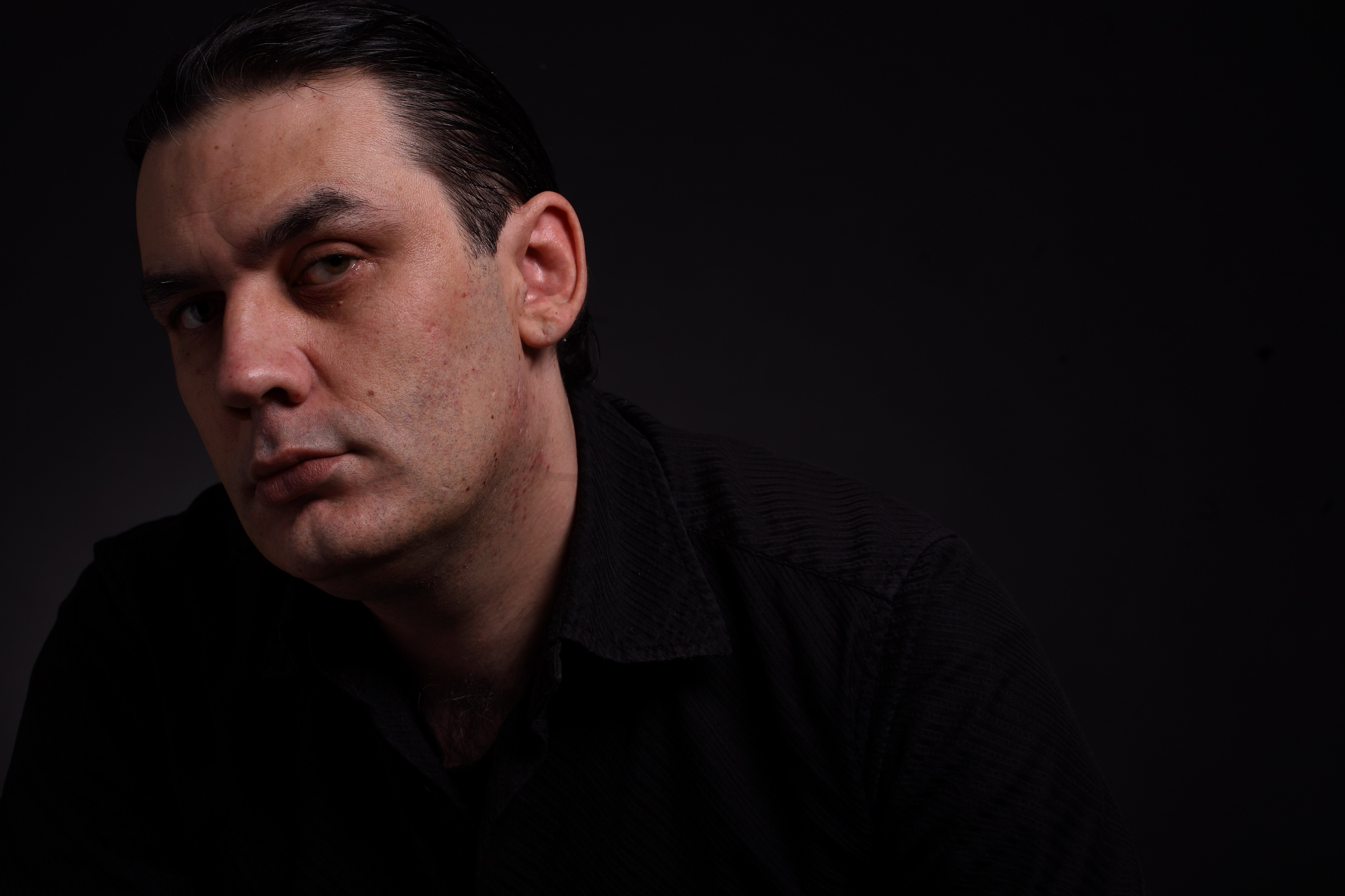 Београд